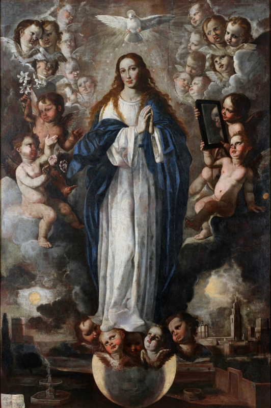 La obra representa la Inmaculada Concepción de la Virgen María, madre de Jesucristo.